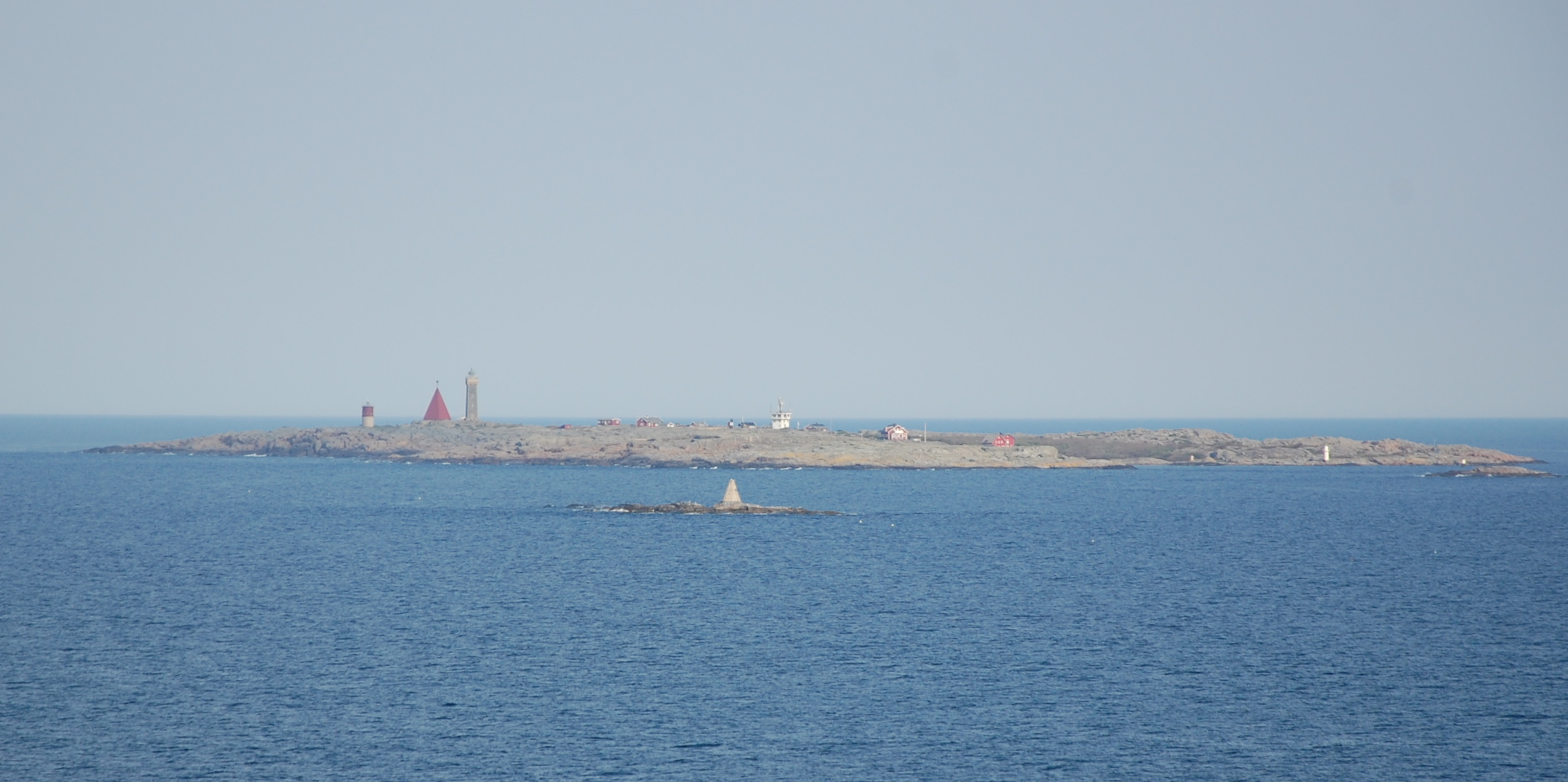 Insel im Schärengarten vor Göteborg